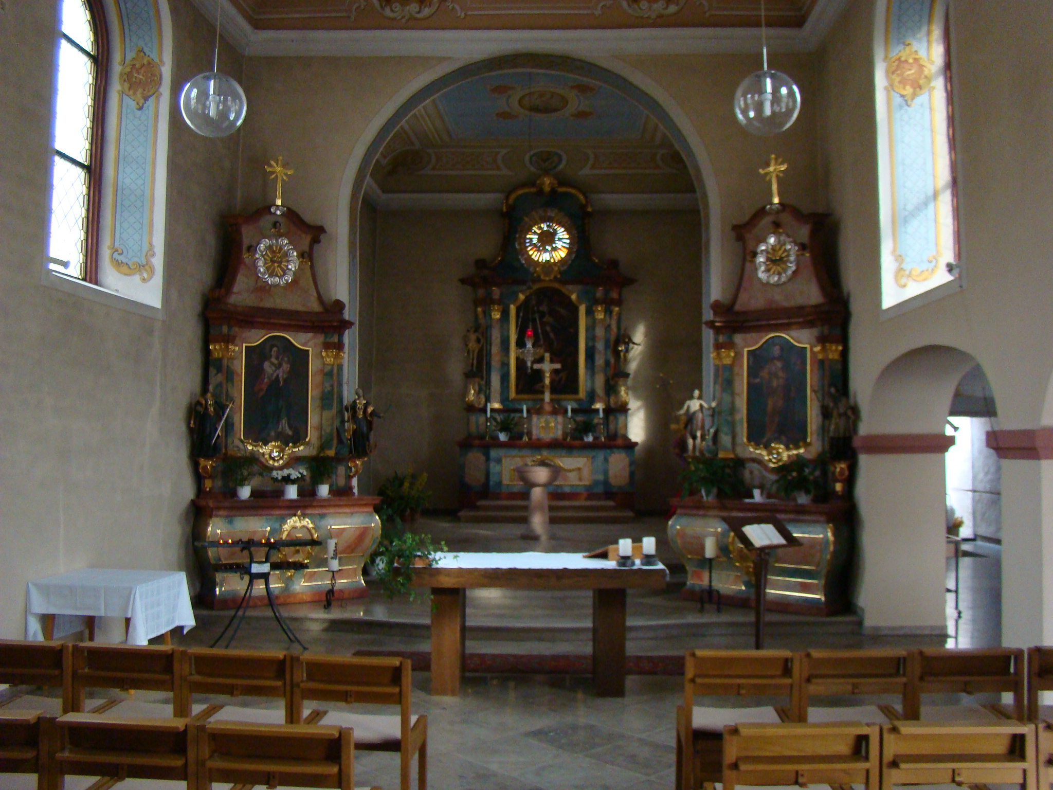 Katholische Kirche St. Michael in Wiesenbach / Baden, Ostchor